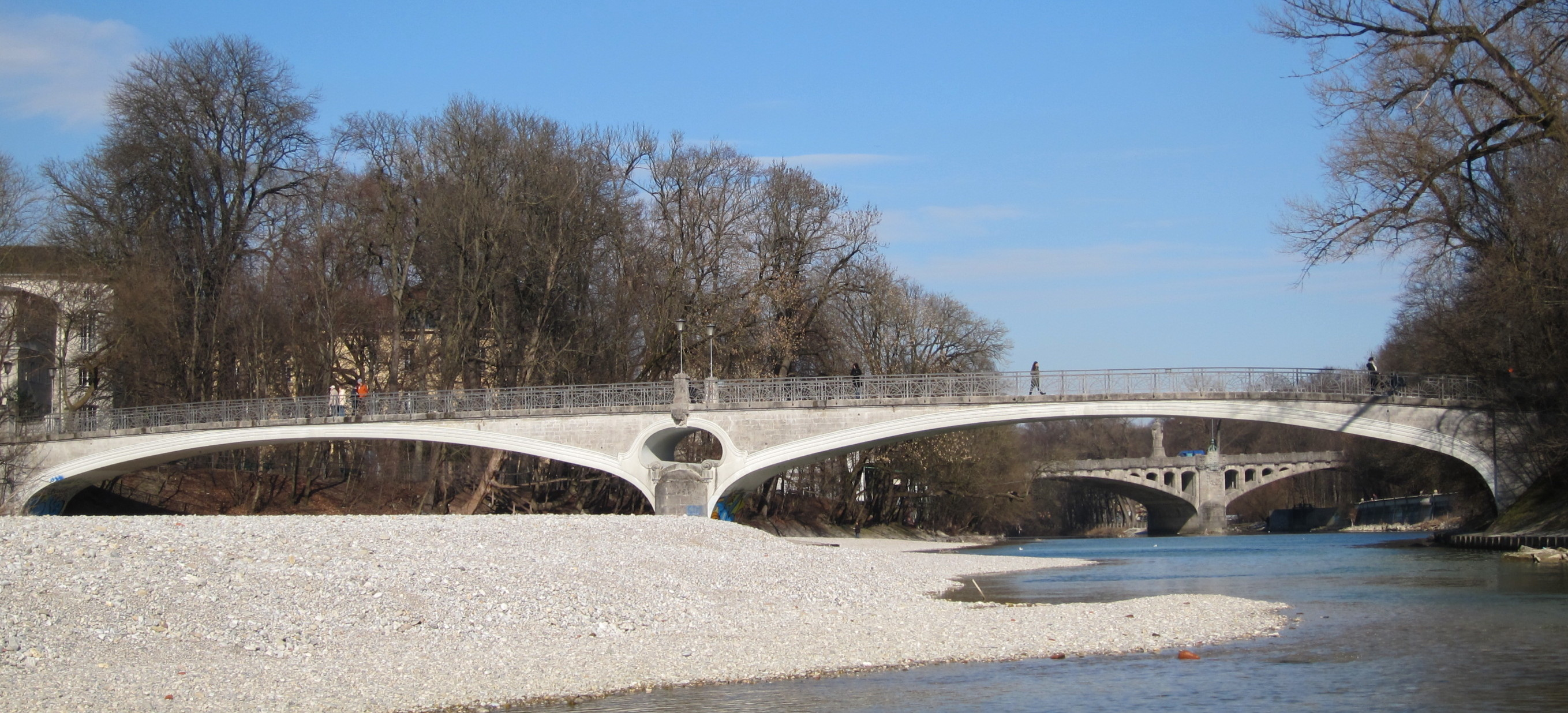 Kabelsteg in München, Maximiliansbrücke im Hintergrund